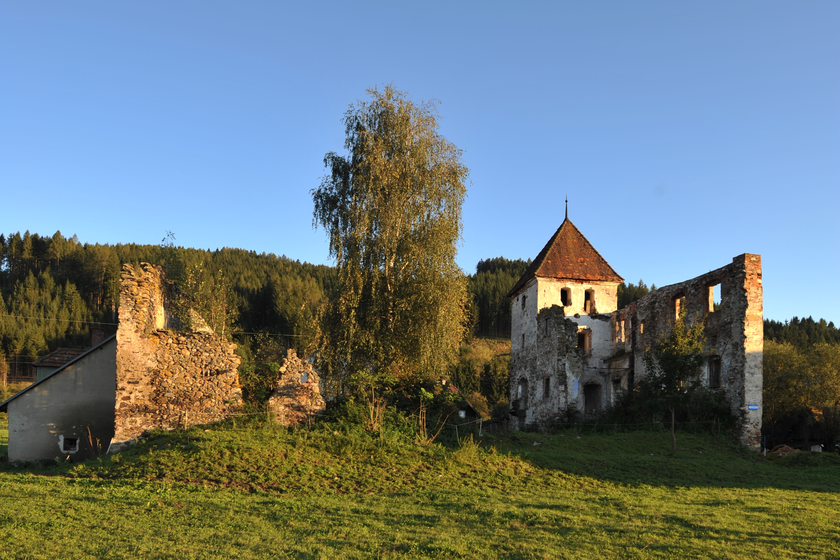 Turm der Ruine Einödhof Dieses Foto wurde im Rahmen des von Wikimedia Österreich unterstützten Projekts Wiki takes oberes Murtal erstellt. The making of this work was supported by Wikimedia Austria. For other files made with the support of Wikimedia Austria, please see the category Supported by Wikimedia Österreich. Object location47° 11′ 33.03″ N, 14° 49′ 37.19″ E